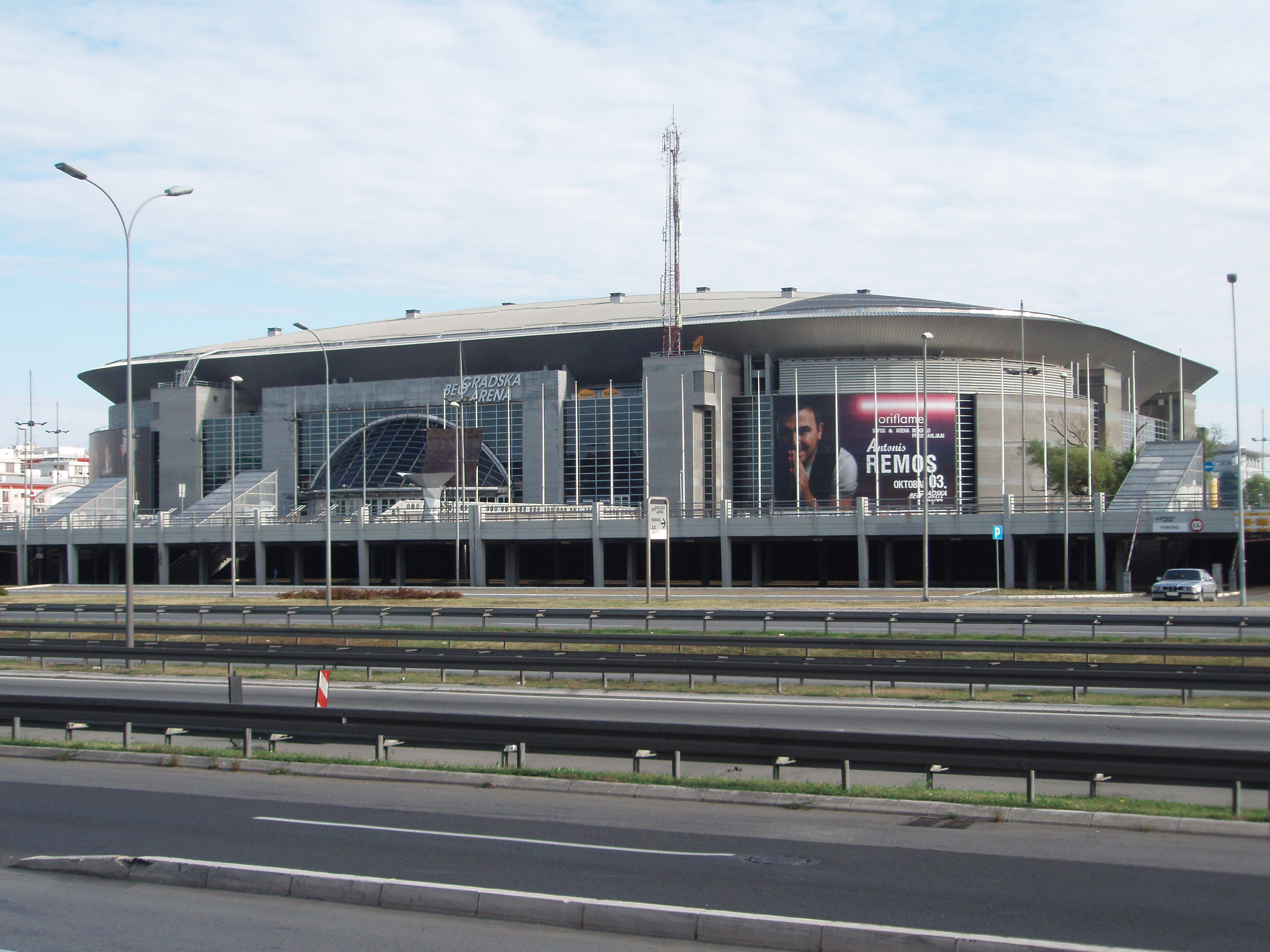 Beogradska arena